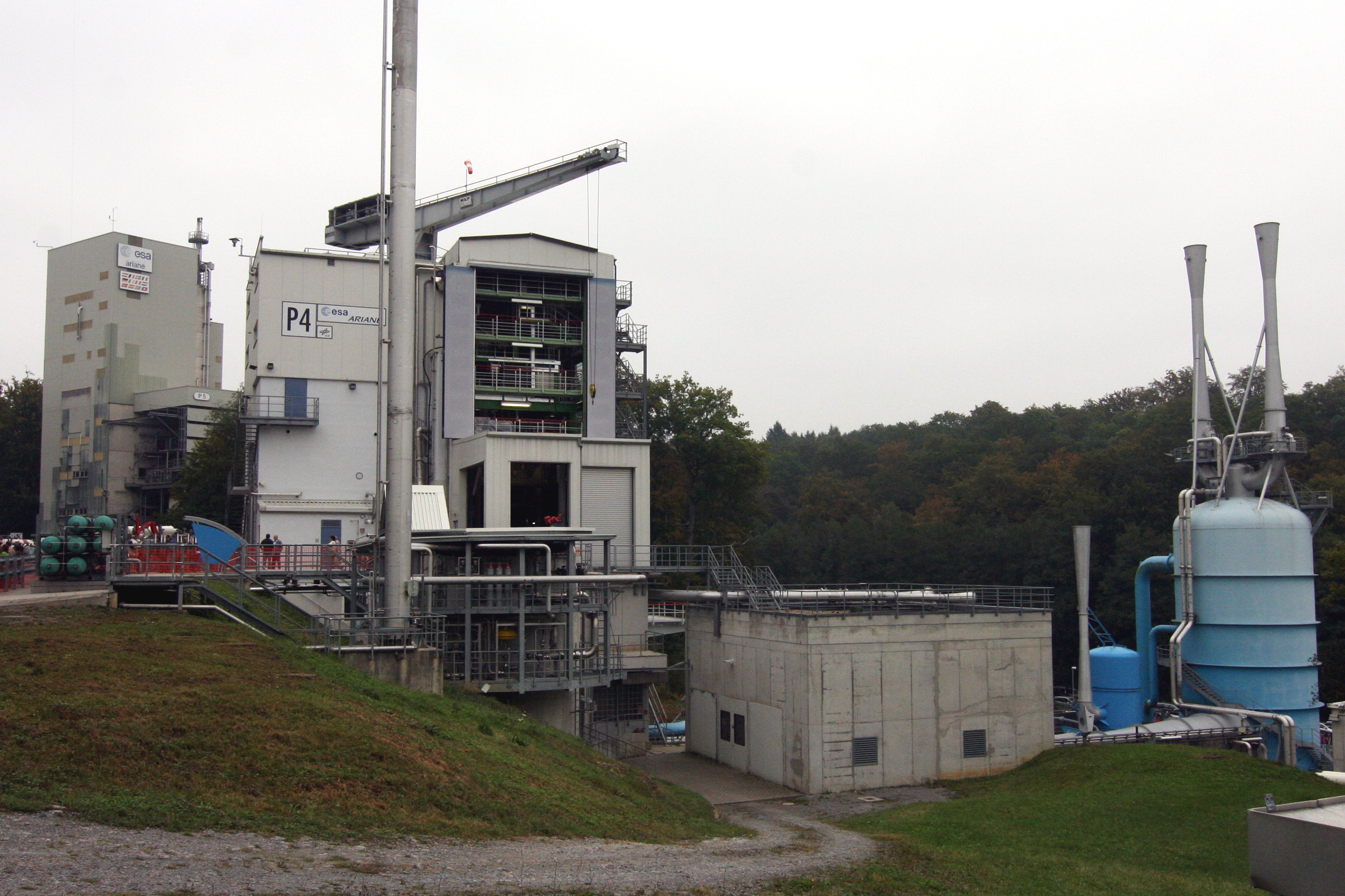 Prüfstand P4 am DLR-Standort Lampoldshausen